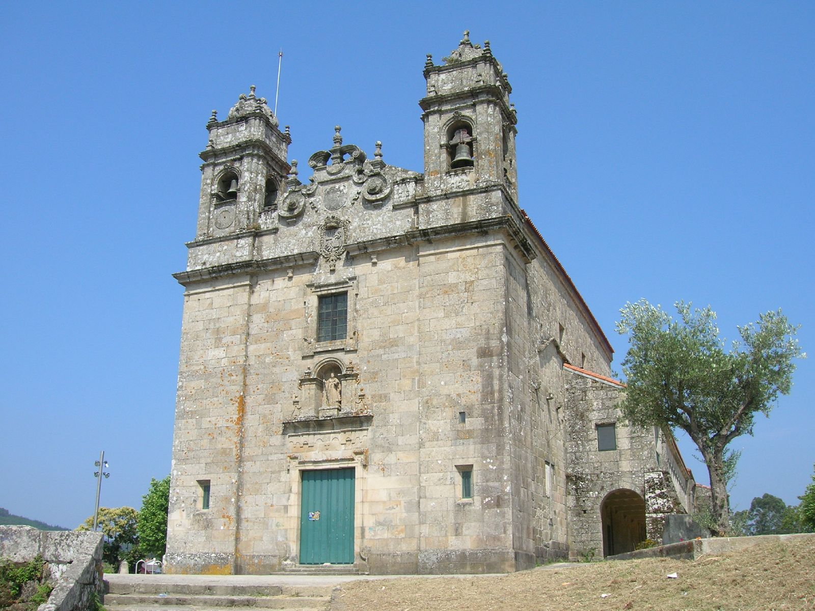 Mosteiro de San Salvador de Lérez. Pontevedra, Galicia - Spain'Monasterio de San Salvador de Lérez'